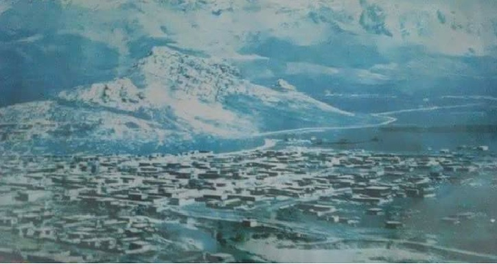 کوردی: سەیدسادق ١٩٧٤